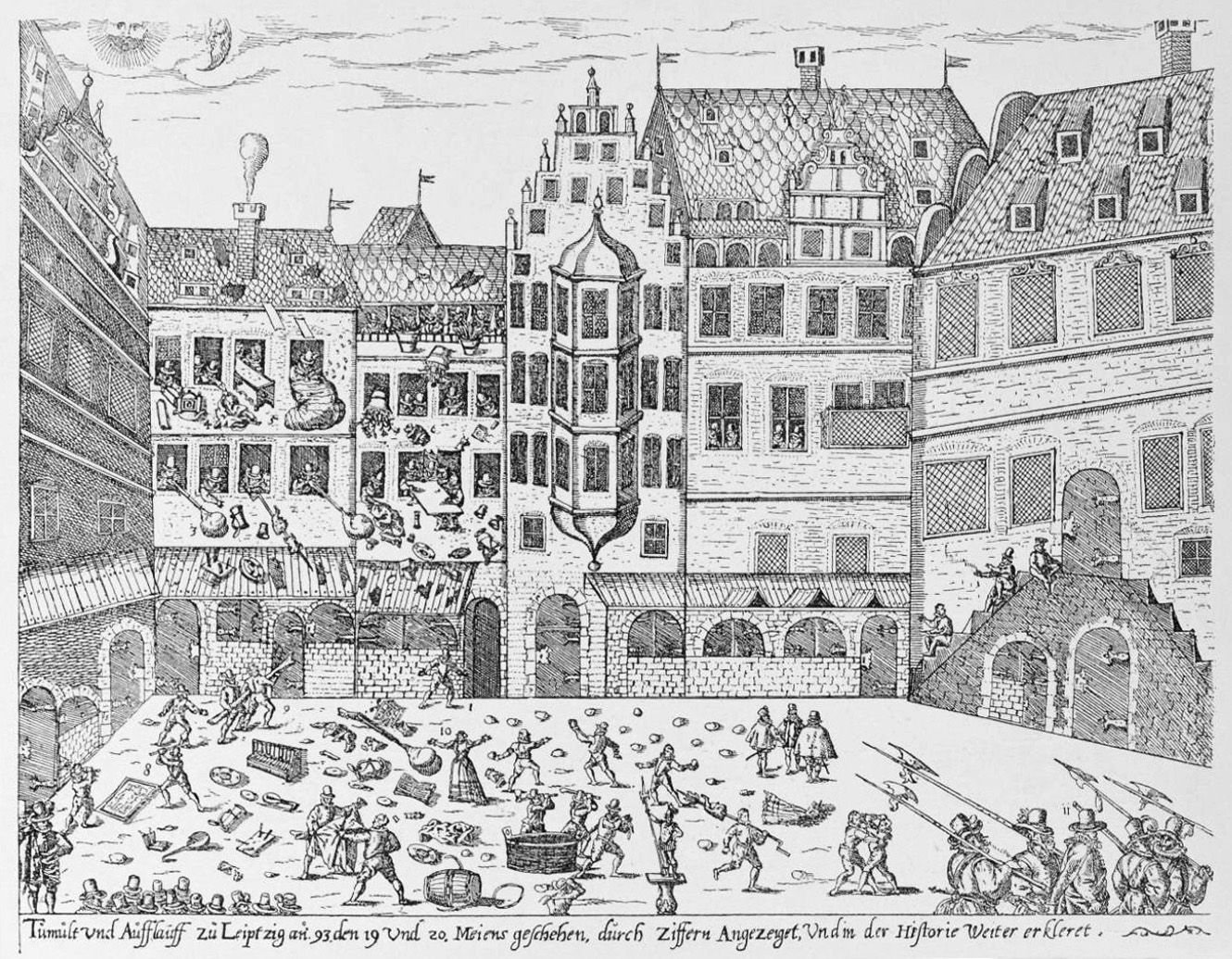 Der Sturm auf des Haus des Calvinisten Adolph Weinhaus (Calvinistensturm) am 20. Mai 1593 am Naschmarkt in Leipzig